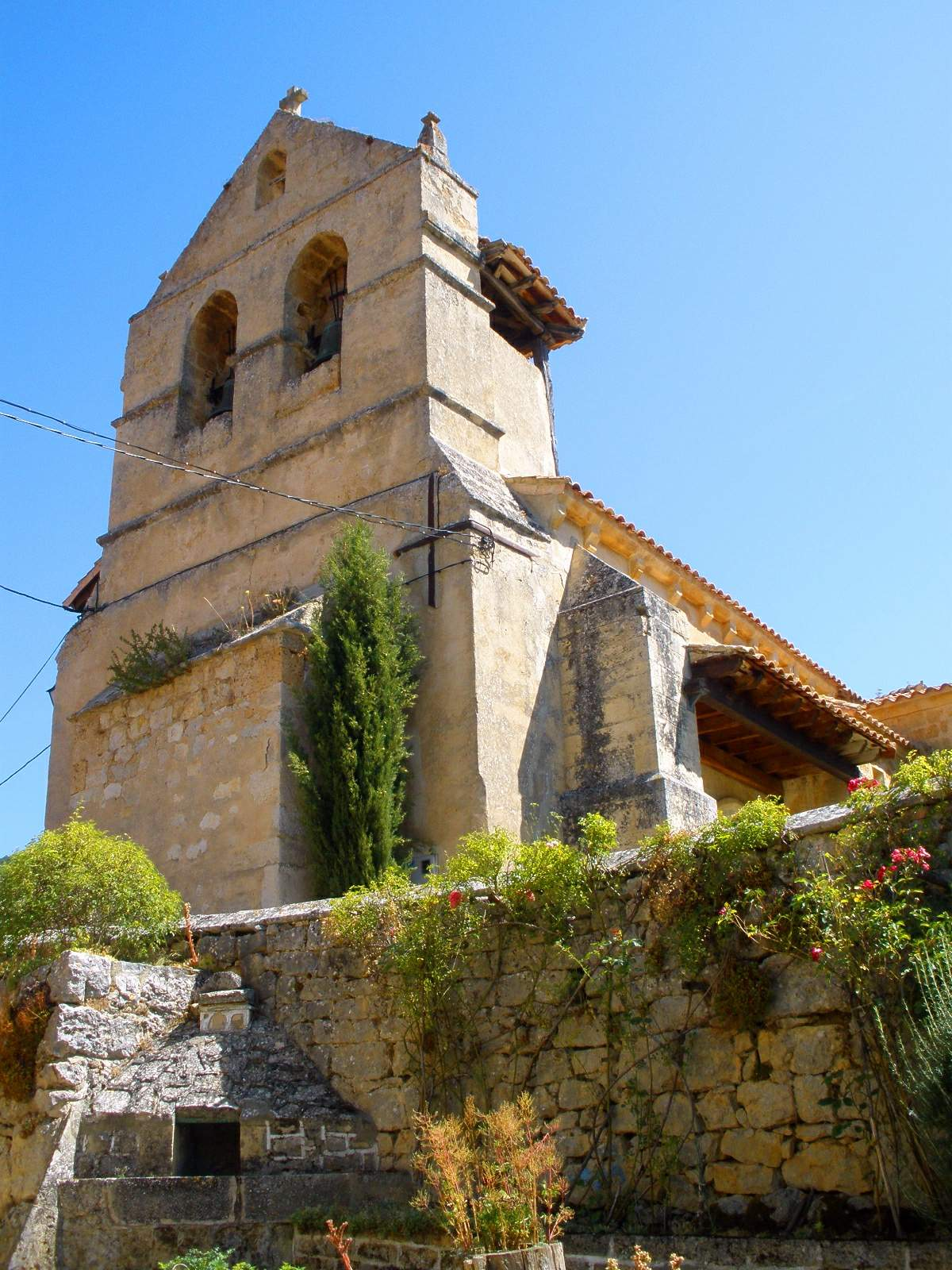 Iglesia de San Cristóbal (Moradillo del Castillo, Burgos)